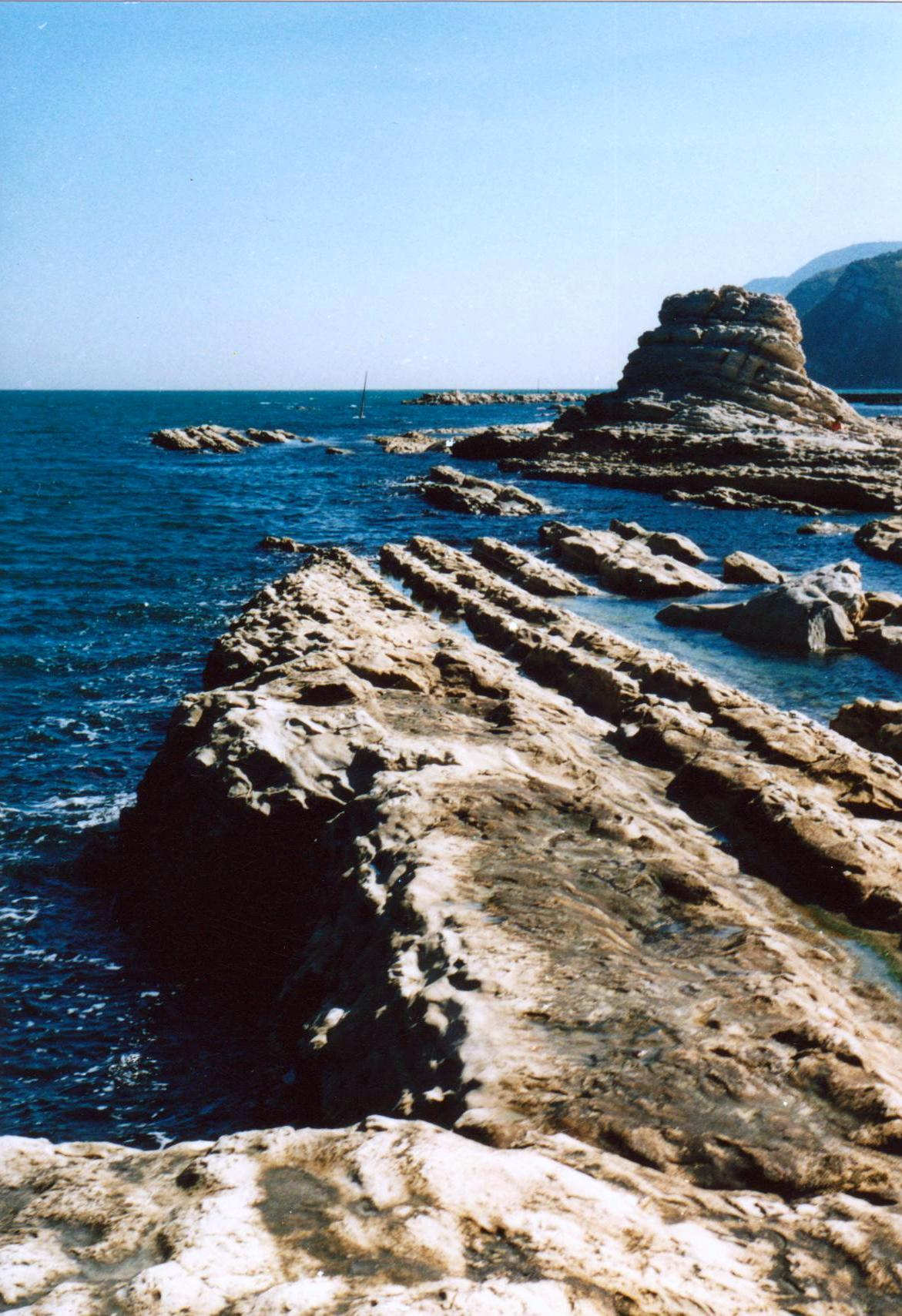 La foto è stata scattata in Ancona, nella spiaggia del Passetto; presenta in primo piano gli scogli del Quadrato e in secondo piano il più noto scoglio della città: la Seggiola del Papa. Sullo sfondo si scorge la punta di Petralacroce e Monte Conero